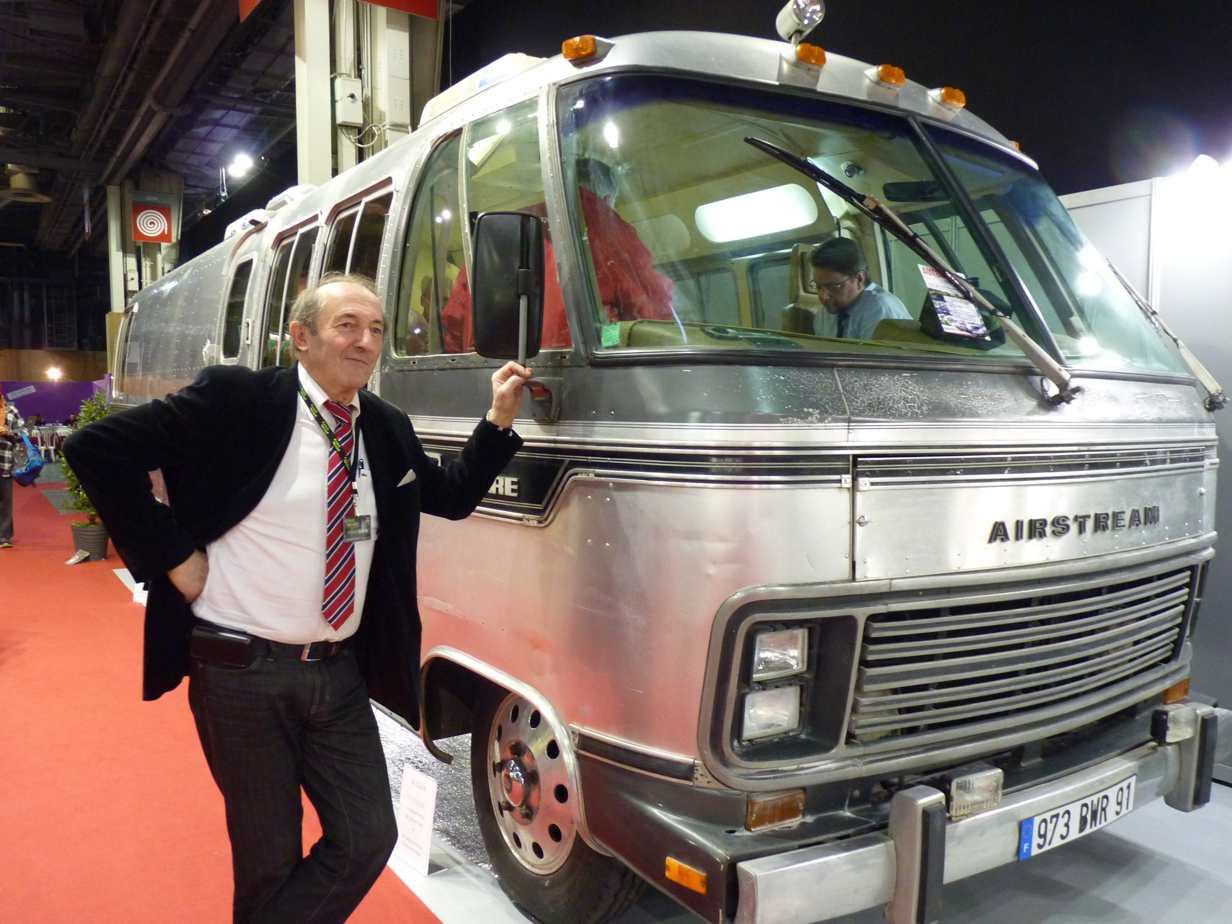 Max Polac avec Automedon à Rétromobile